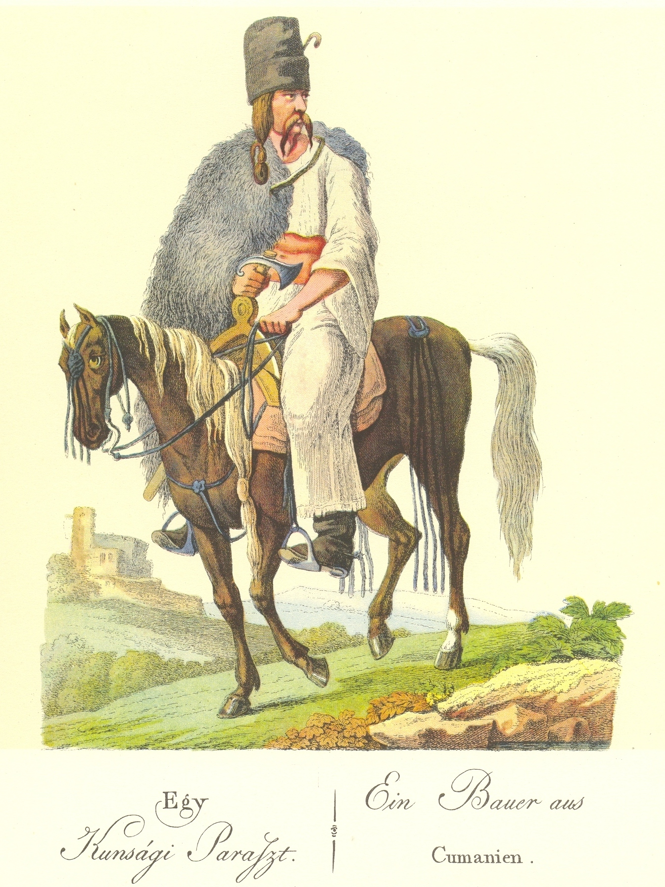 Egy Kunsági paraszt, J. Heinbucker, színezett rézmetszet, 1816